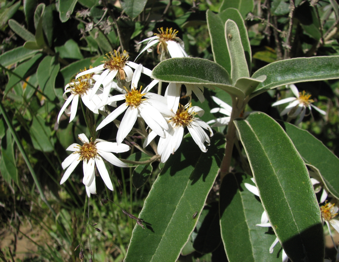 Olearia megalophylla, Licola-Jamieson Road, Victoria, Australia